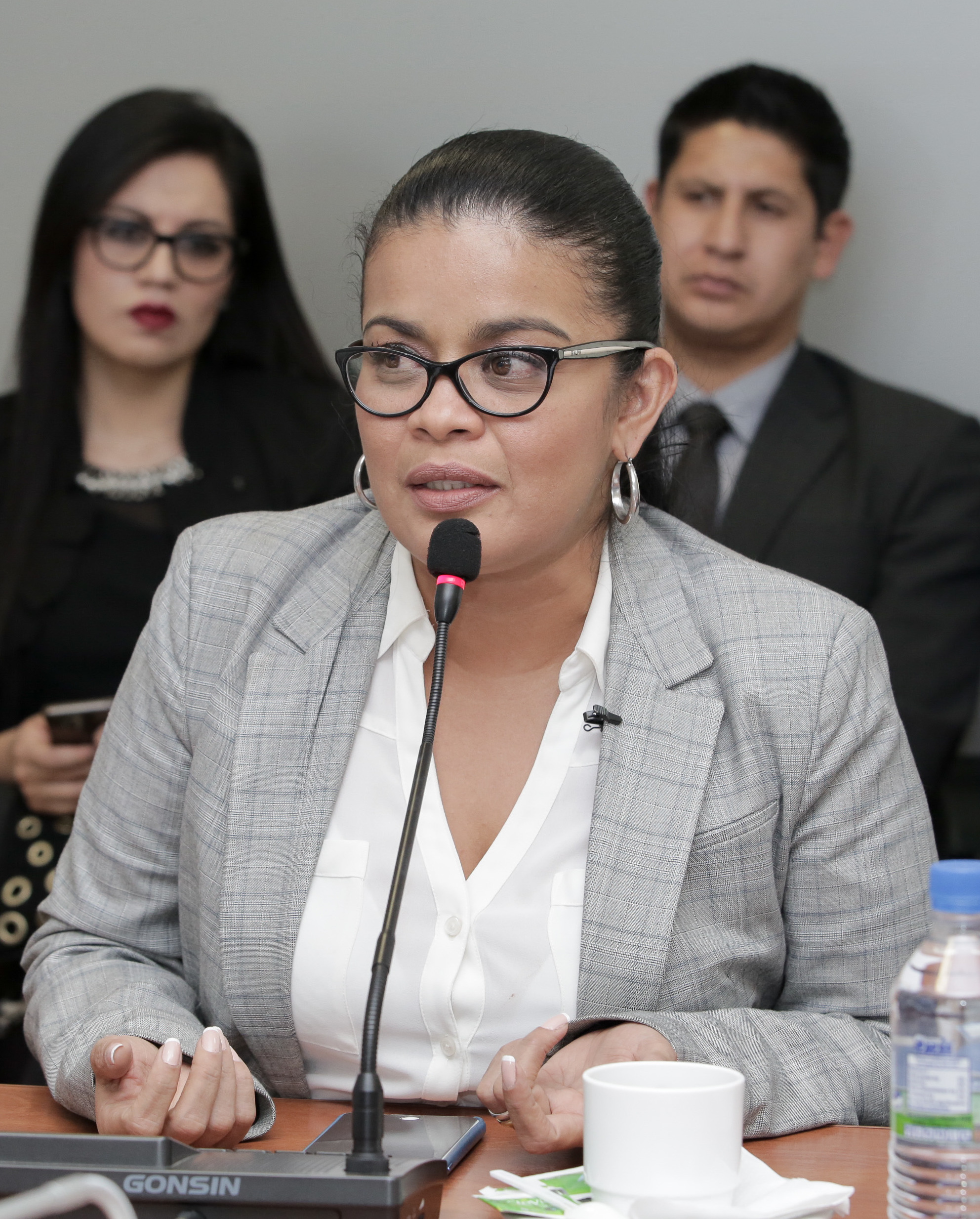 7 de marzo de 2017 - Comisión de Justicia recibe a la alcaldesa del Cantón Durán, Alexandra Arce Tema: Reformas al Código Orgánico Integral Penal; y, conocimiento y aprobación del plan de trabajo de la Comisión de enero a mayo de 2017. Fotografía: Alberto Romo/Asamblea Nacional